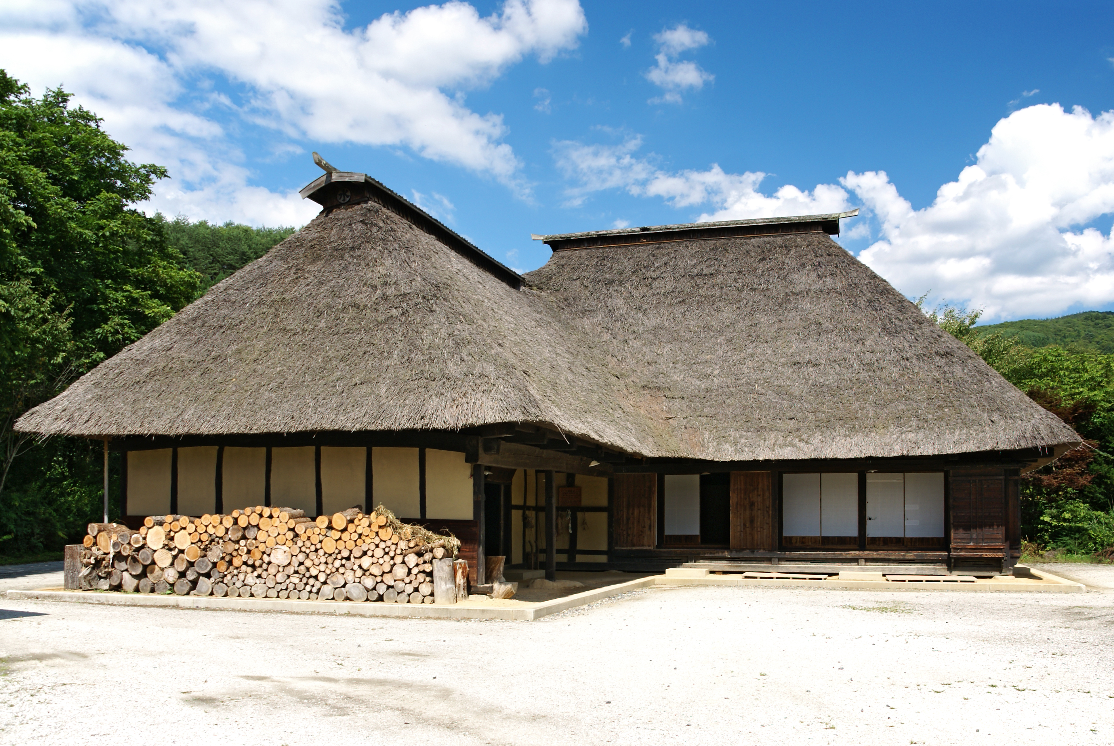 Tono Furusato-mura in Tono, Iwate prefecture, Japan